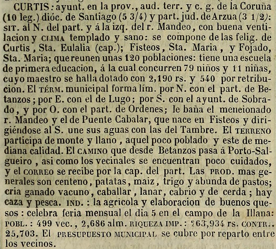 Concello de Curtis no Diccionario geográfico-estadístico-histórico de España y sus posesiones de Ultramar.